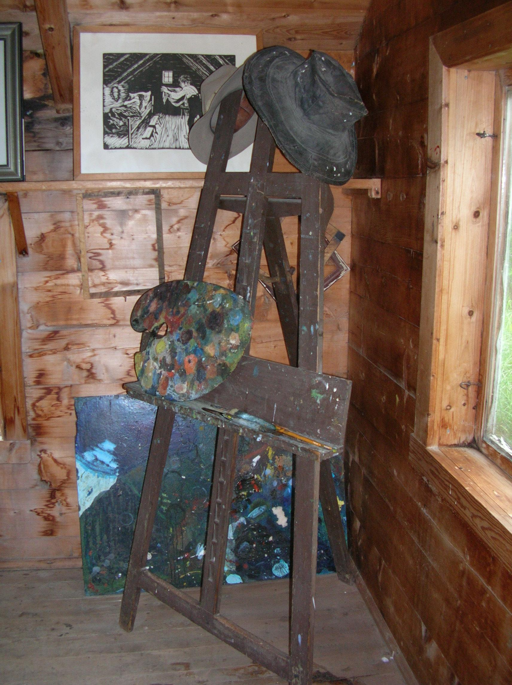 Interiør i Nikolai Astrups atelier, bl.a. staffeliet og hatten hans.